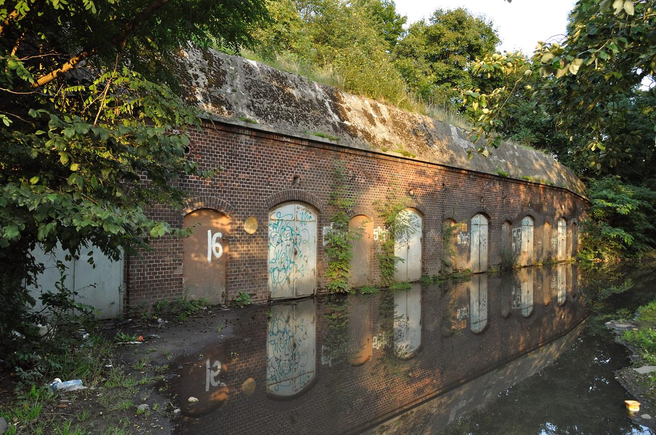 Schron piechoty przy ulicy Kwidzyńskiej.